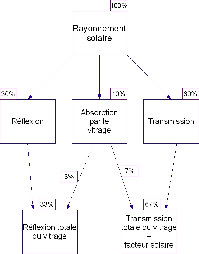 organigramme expliquant le facteur solaire des vitrages